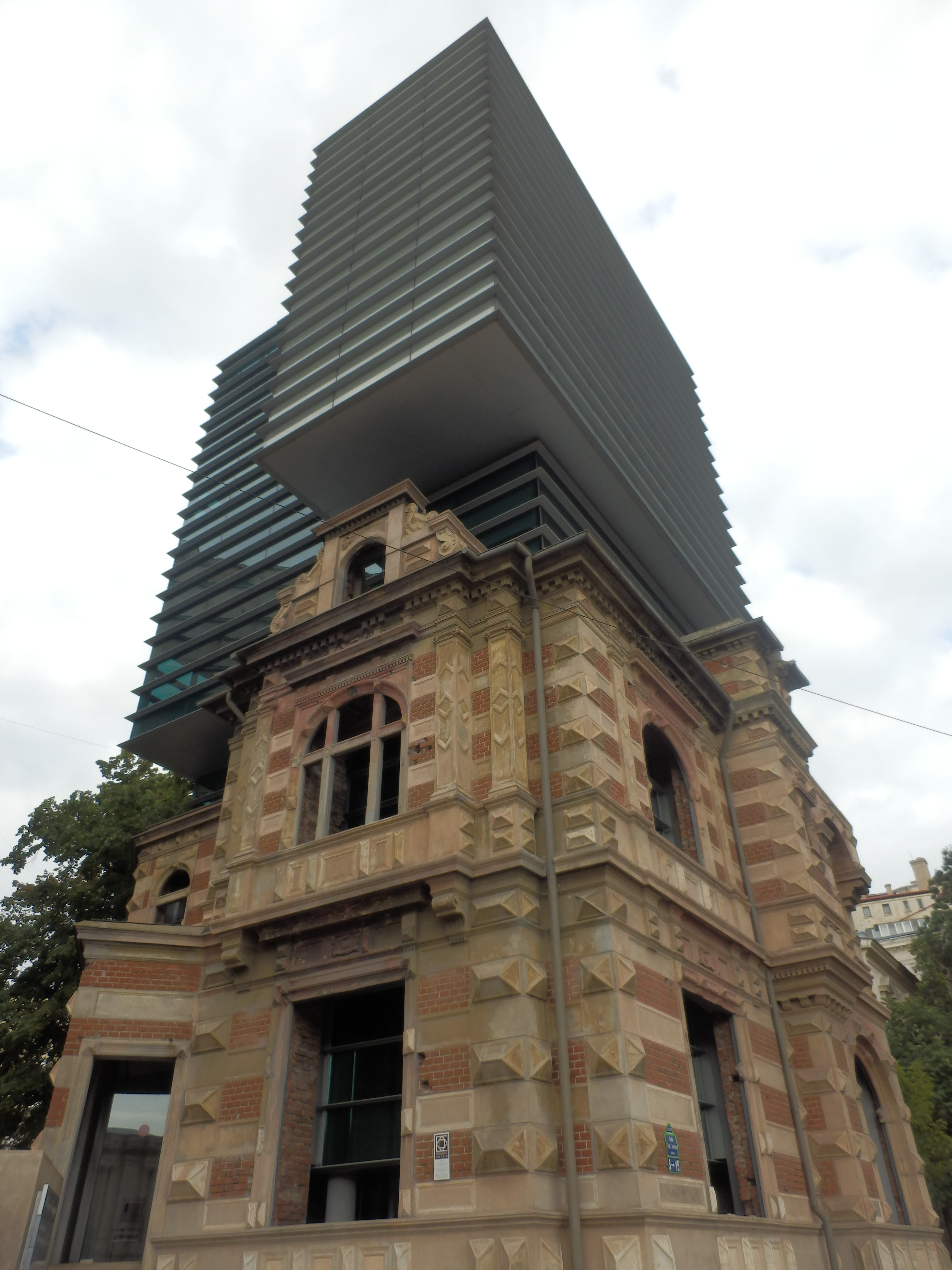 Bucharest, Romania